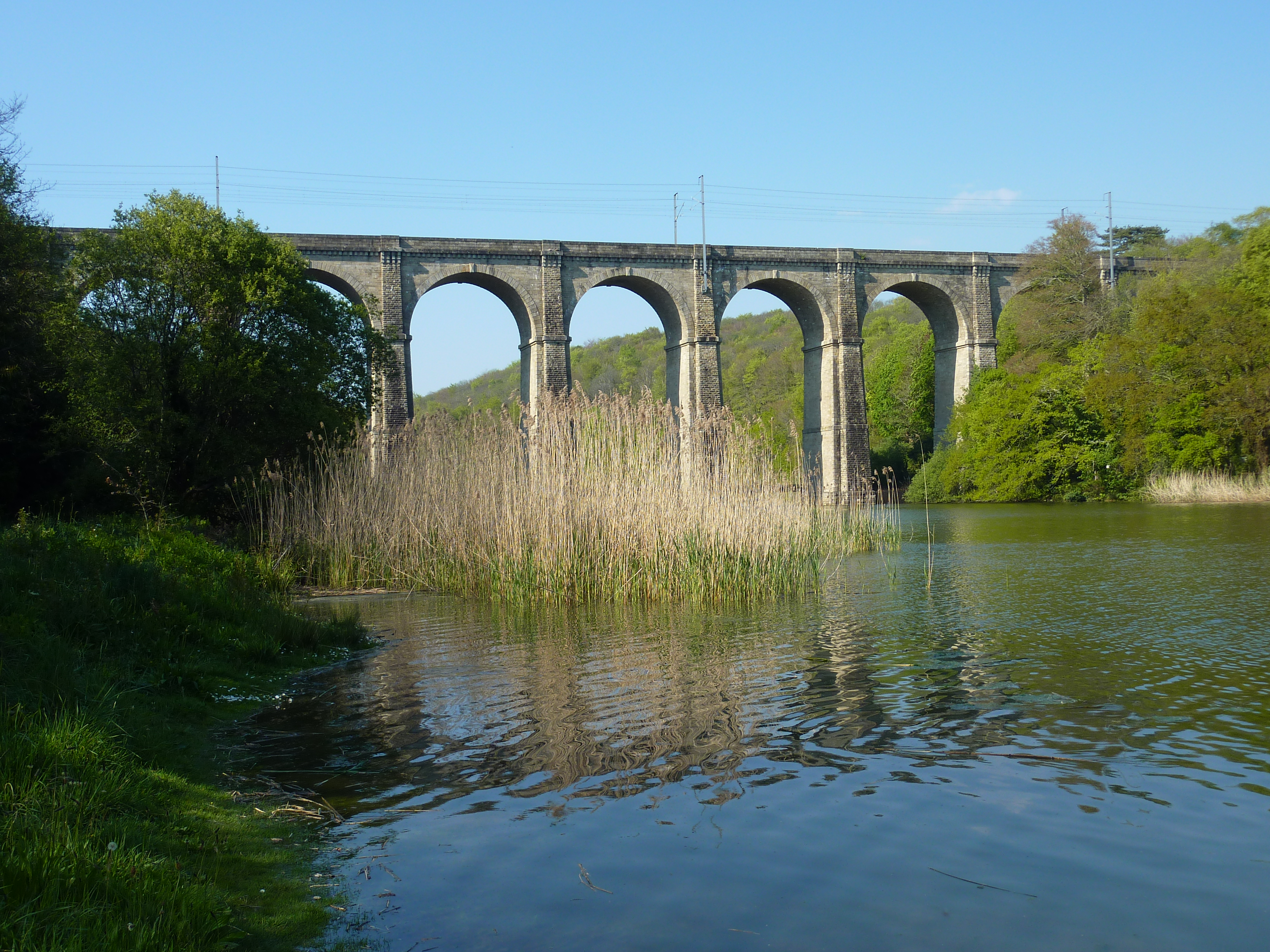 Le Relecq-Kerhuon : le viaduc du chemin de fer sur l'Anse de Kerhuon